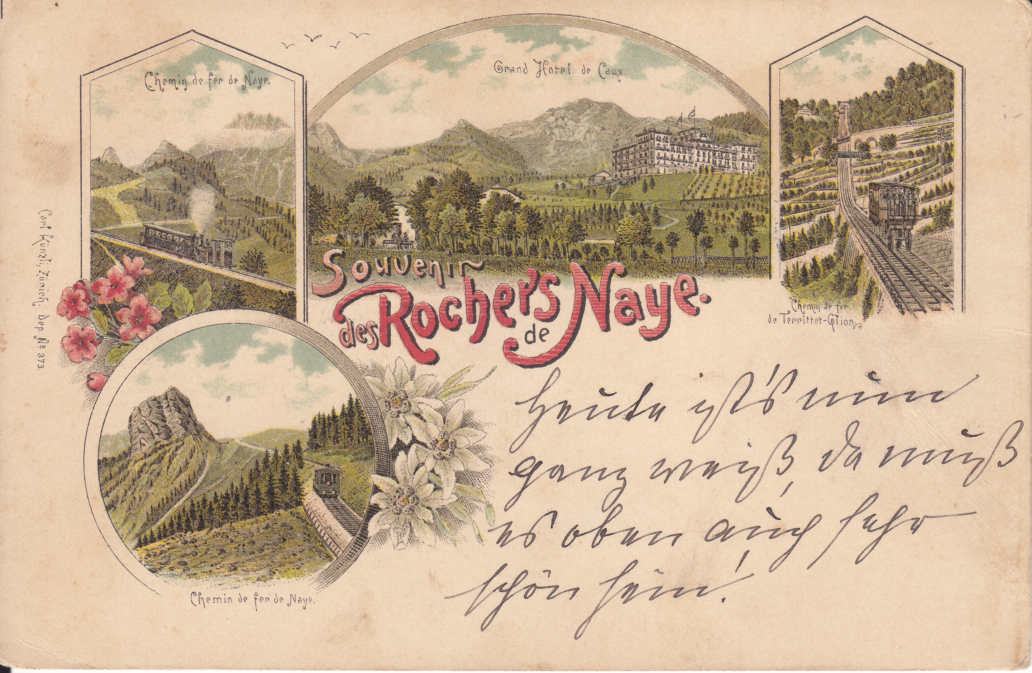 Ansichtskarte aus dem Verlag von Carl Künzli, Zürich, No. 373. Gelaufen, Poststempel 1897.